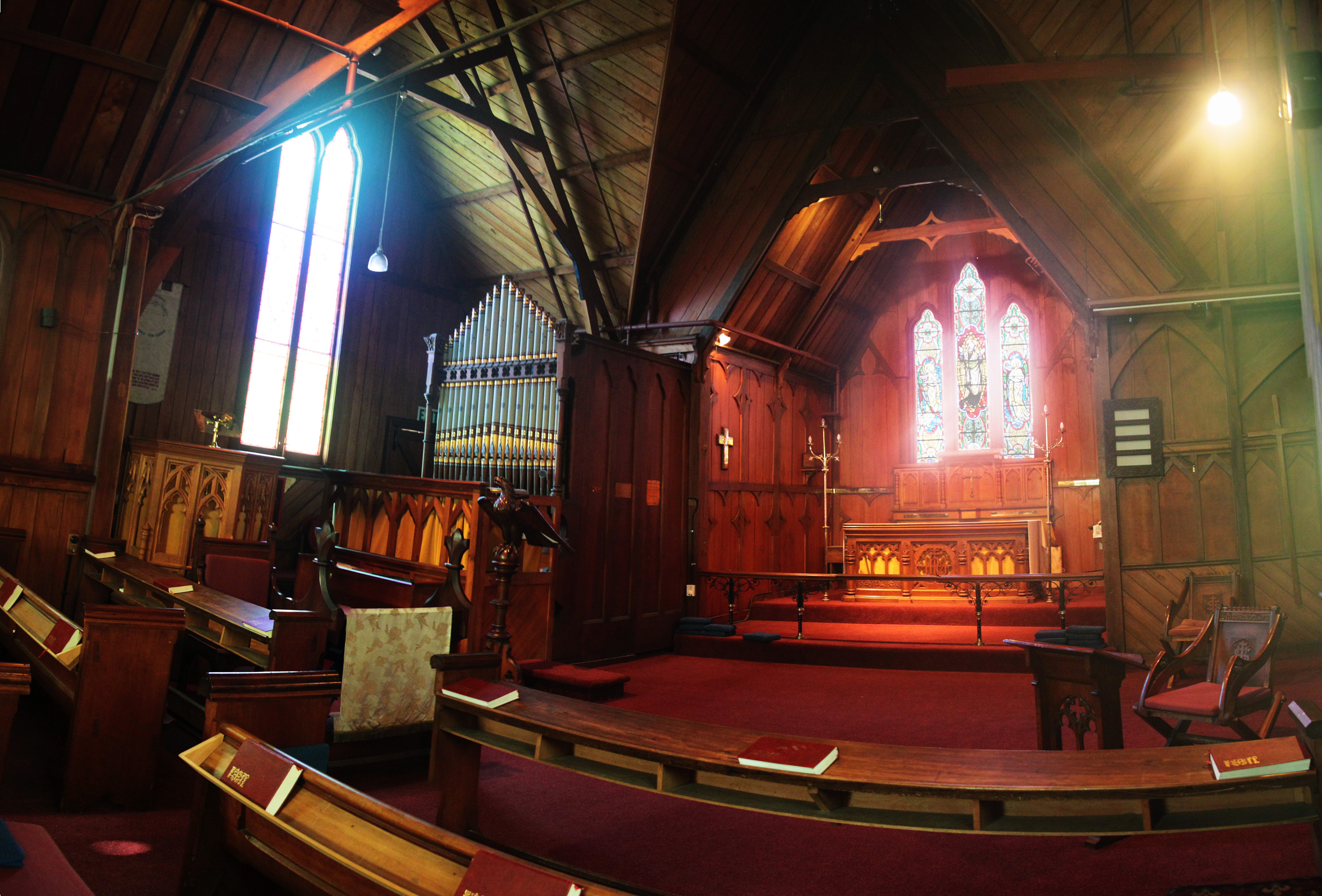 Eglise Saint Peter d'Akaroa